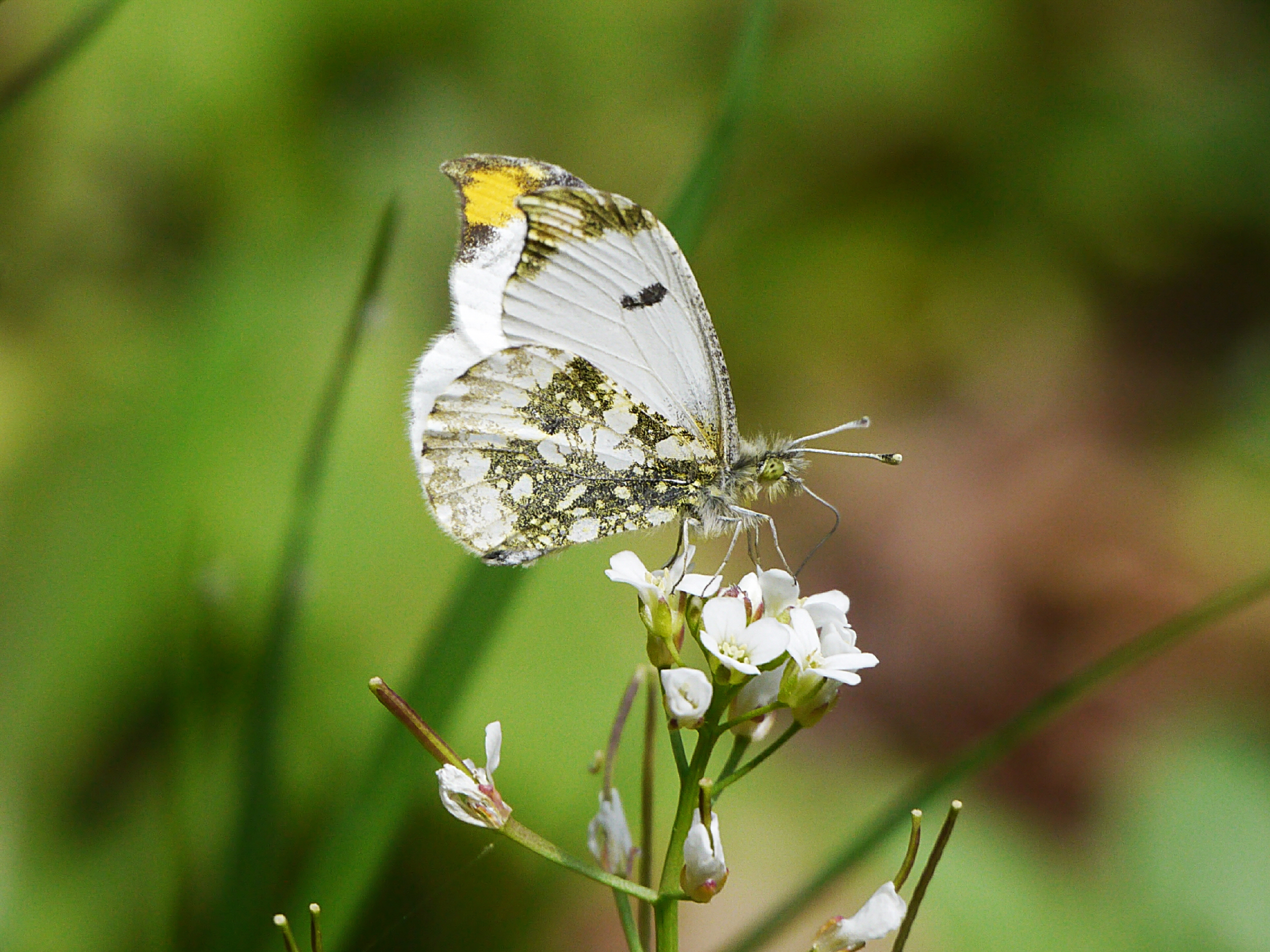 ツマキチョウ♂ー東京